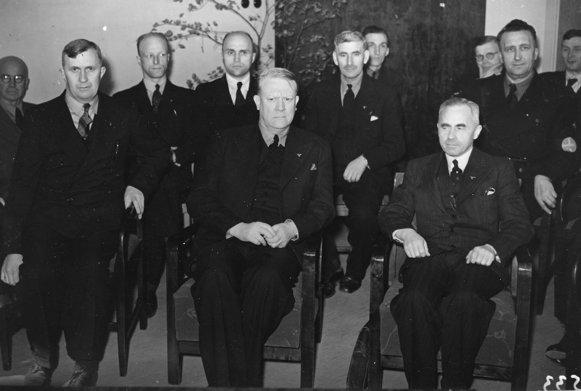 1942/04/24. RA/RAFA-3309/U 39B/8 /39-8-2 img247 Nasjonal Samling, forkortet NS, var et norsk politisk parti som ble grunnlagt av Vidkun Quisling i 1933 og ble oppløst ved frigjøringa i 1945. Ideologisk fulgte partiet den tyske nasjonalsosialismen, og NS ble støtteorganisasjon for den tyske okkupasjonsmakta i Norge under andre verdenskrig.